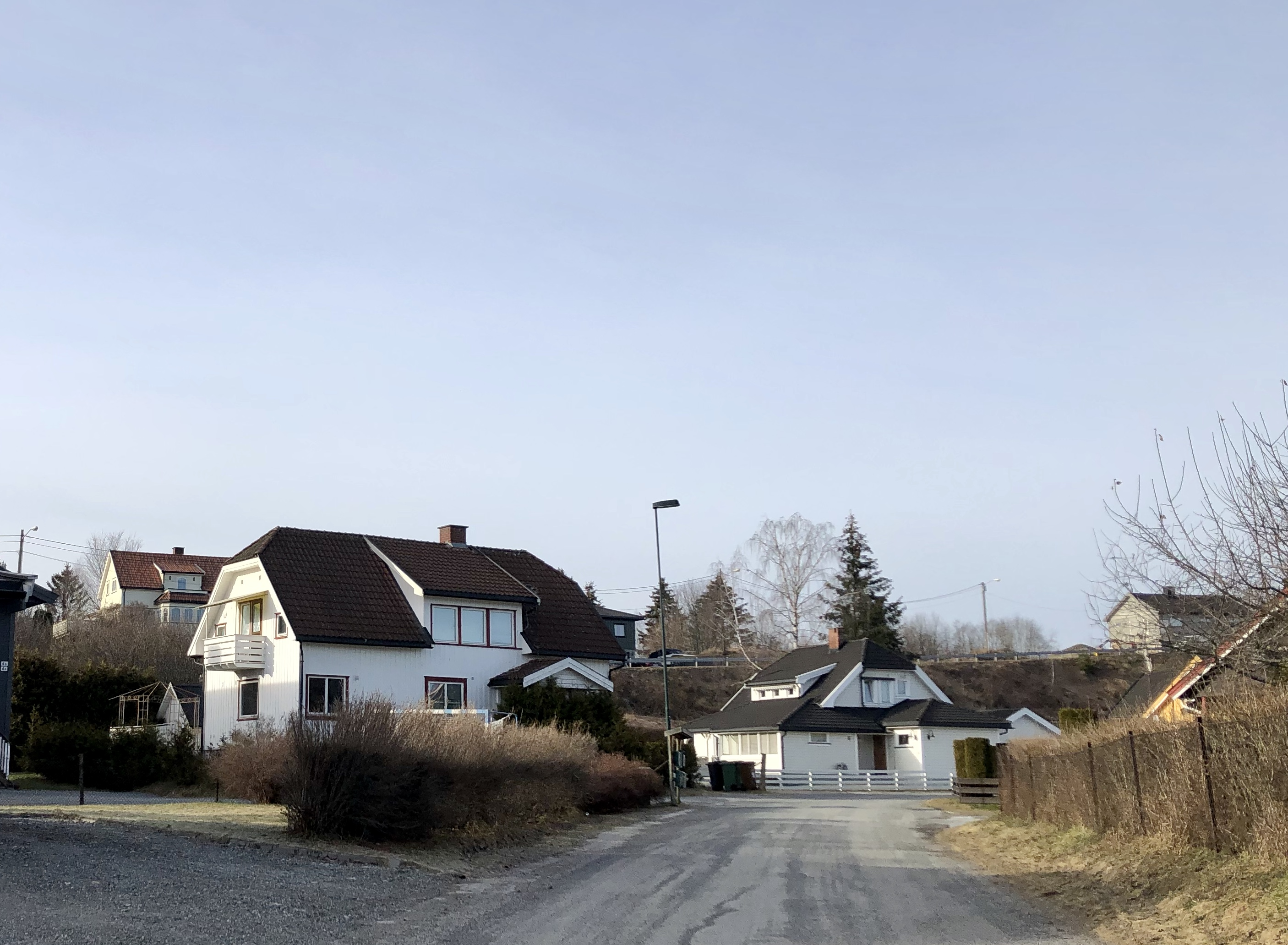 Mindes vei 4C, 4D og 6, Hønefoss